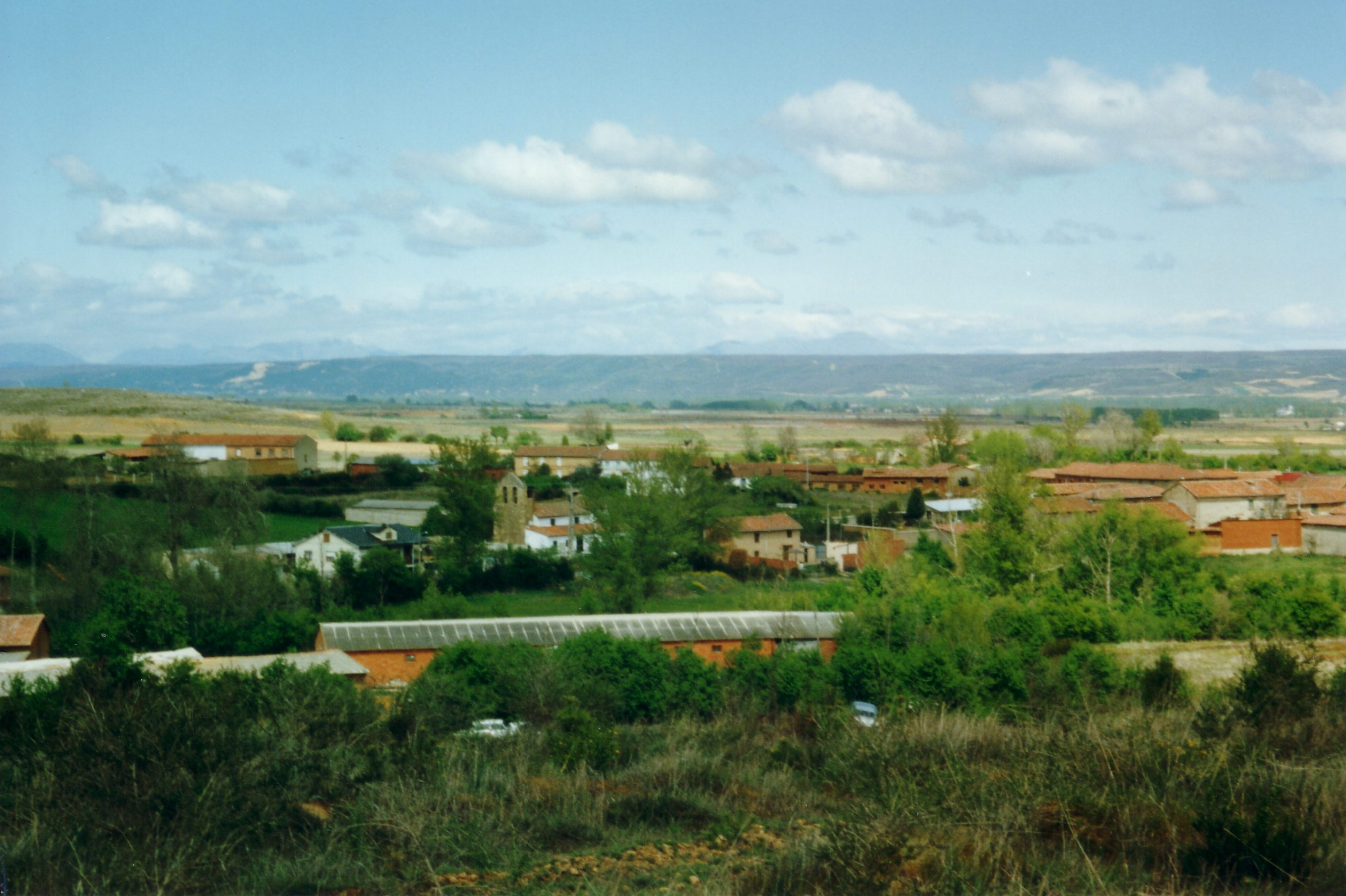 Vista de navafria desde El Jano